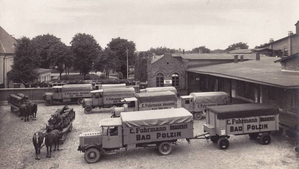 Browar w Połczyn-Zdrój